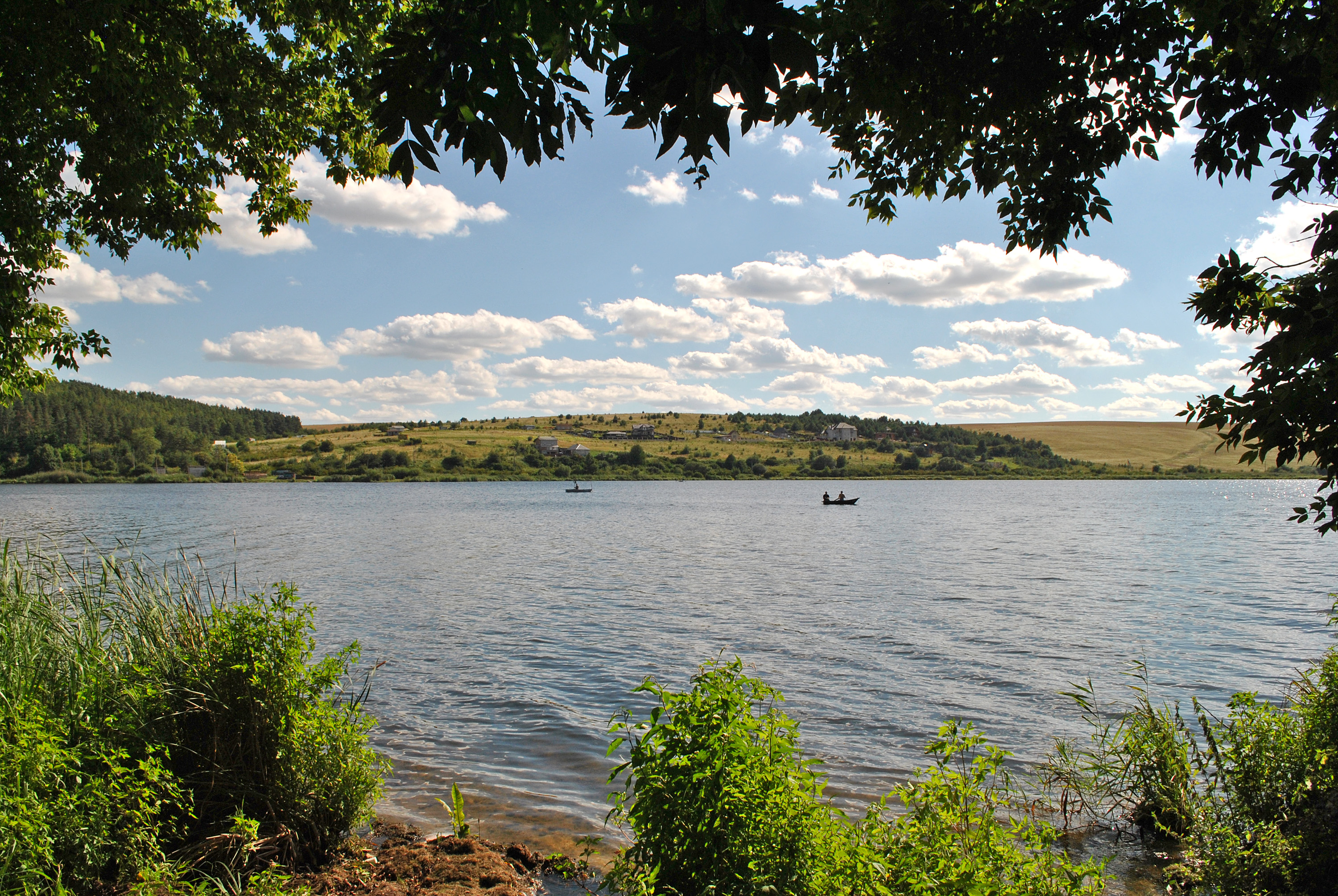 Став у Івачеві Горішньому Тернопільського району. Вигляд з лівого берега річки Серет. За межами кадру праворуч на правому березі - село Глядки, прямо за пагорбом - село Глибочок.